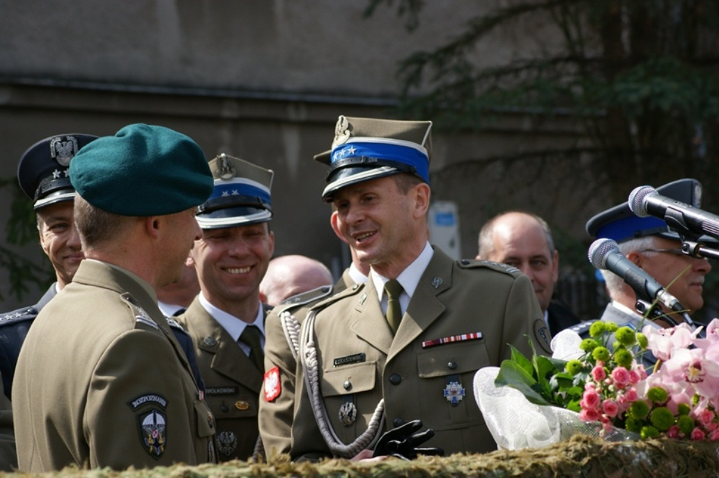 Dowódca Garnizonu Przasnysz 2013, jednocześnie dowódca JW 5699 - płk Witold Łukaszewski (2012- )